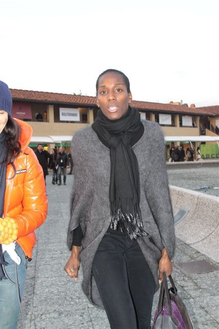 Fiona May Iapichino (Slough, 12 dicembre 1969) è una ex atleta e attrice italiana di origine britannica.